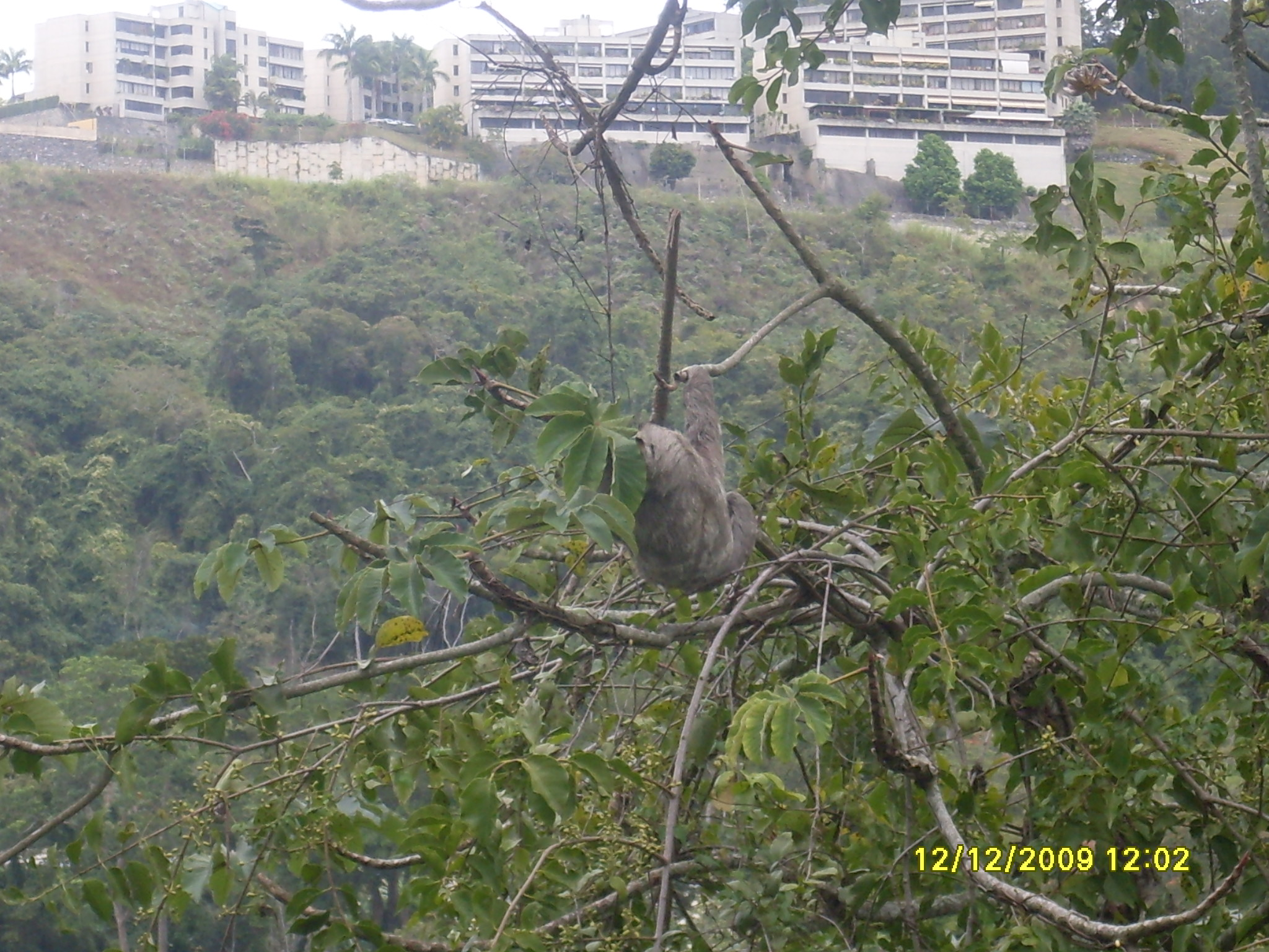 Pereza (Bradypus tridactylus) La Boyera, Miranda - Venezuela